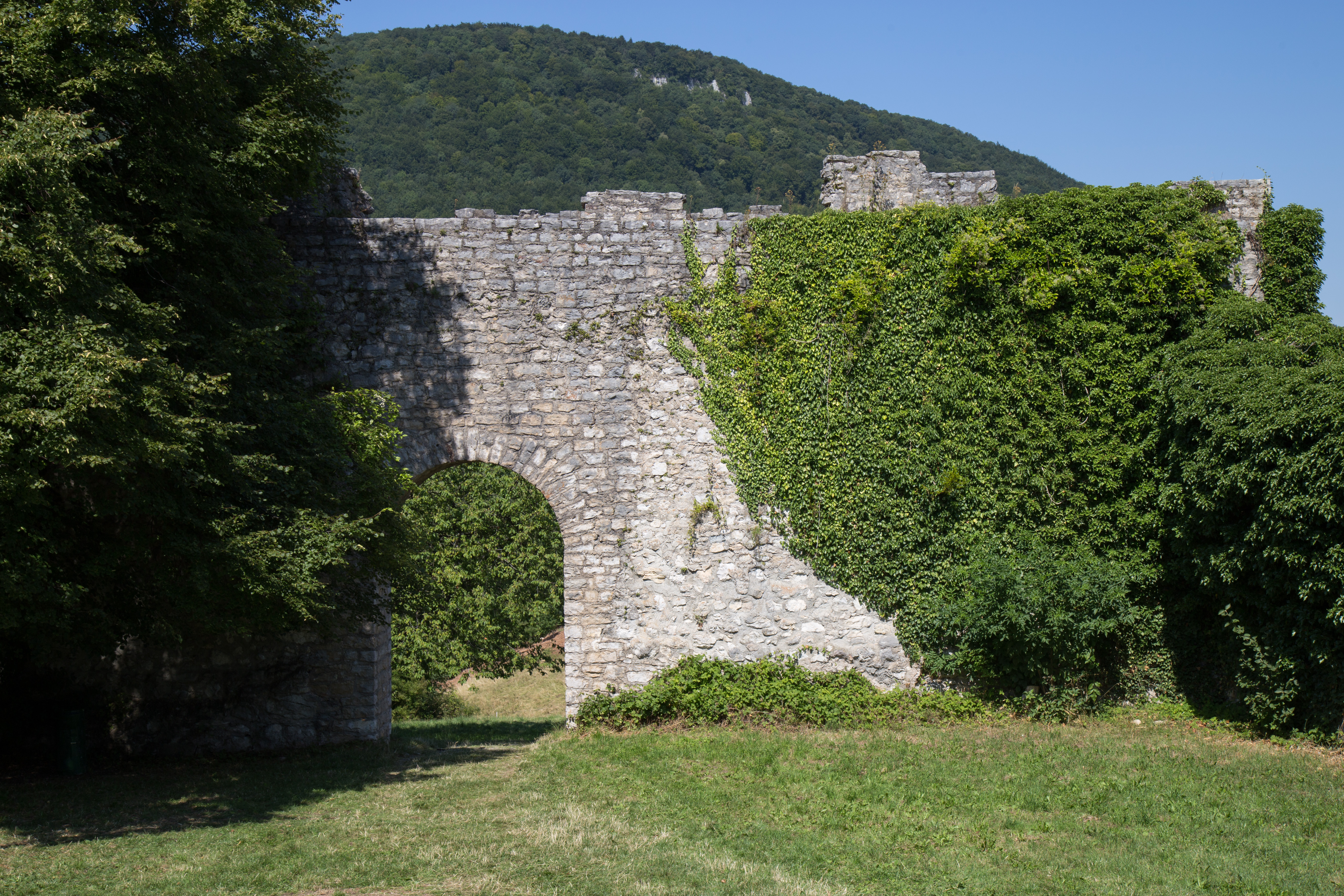 Ruine Sulzburg bei Unterlenningen im Lautertal